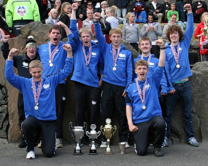 Føroyskt: Jallurin við dreingjum, føroyameistari 2011